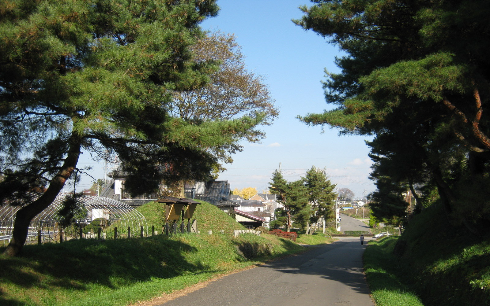 須賀川一里塚